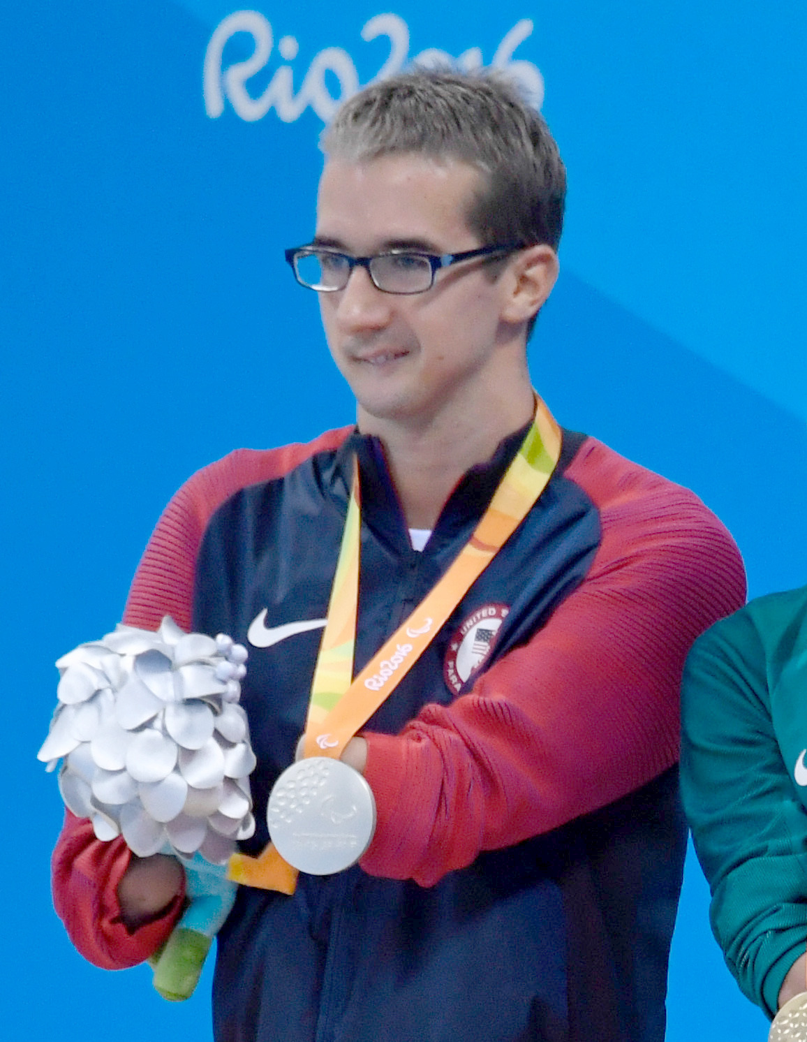 Rio de Janeiro - Brasileiro Daniel Dias leva medalha de ouro nos 200m nado livre S5 nos Jogos Paralímpicos Rio 2016, no Estádio Aquático